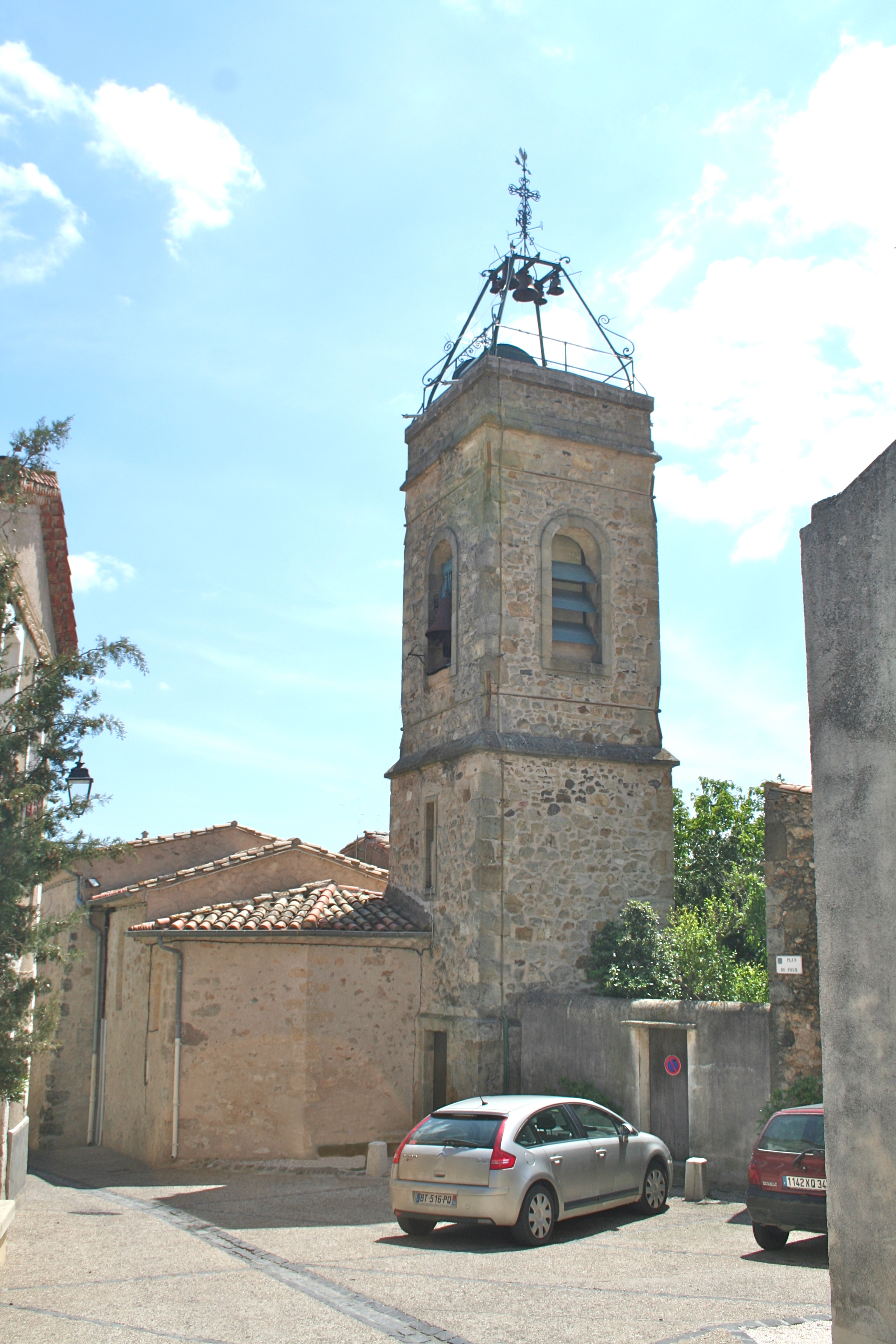 Lieuran-Cabrières (Hérault) - clocher de l'église Saint-Martin